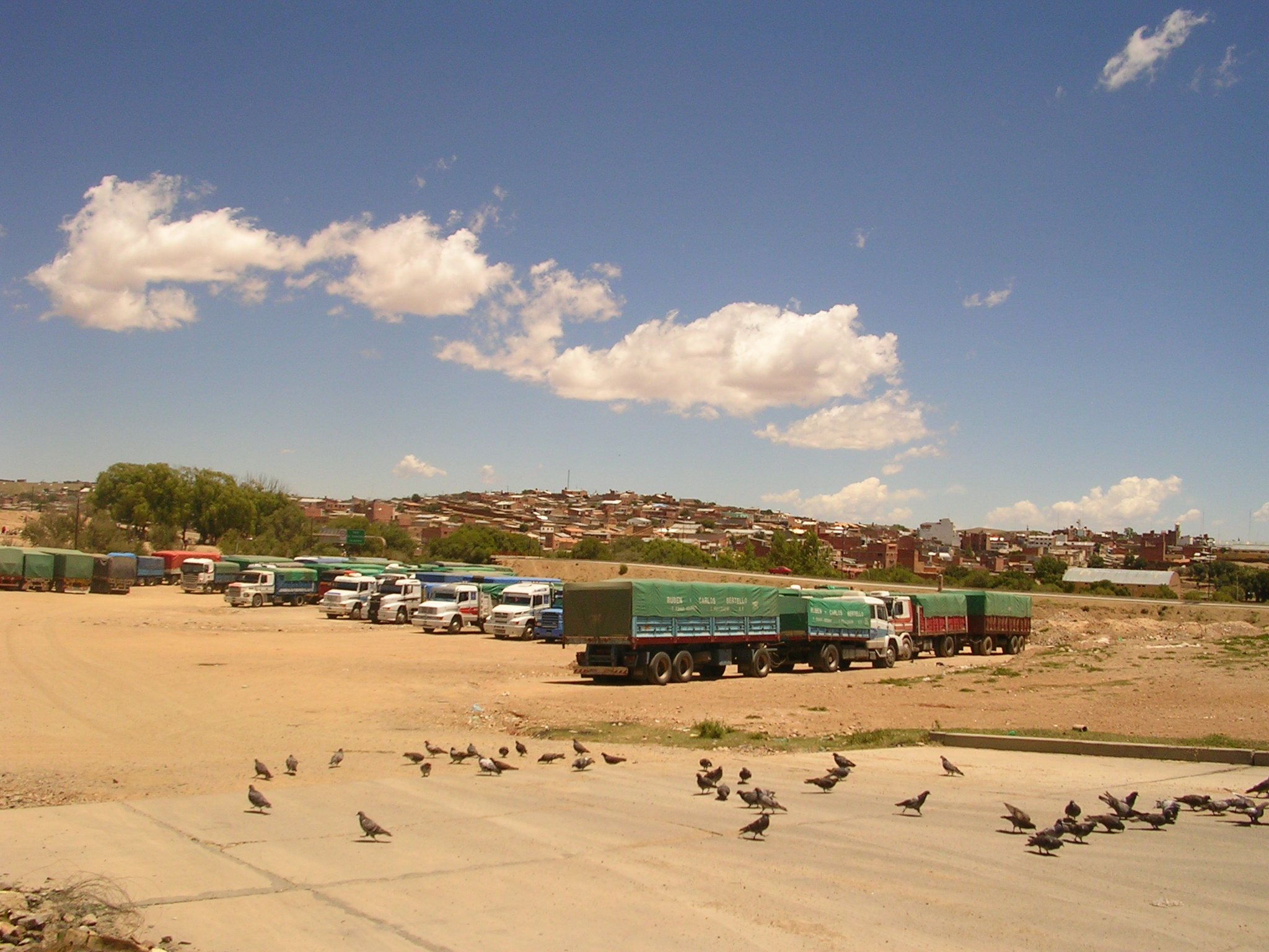 Camiones en La Quiaca en la frontera entre Argentina y Bolivia (con Villazón de fondo)